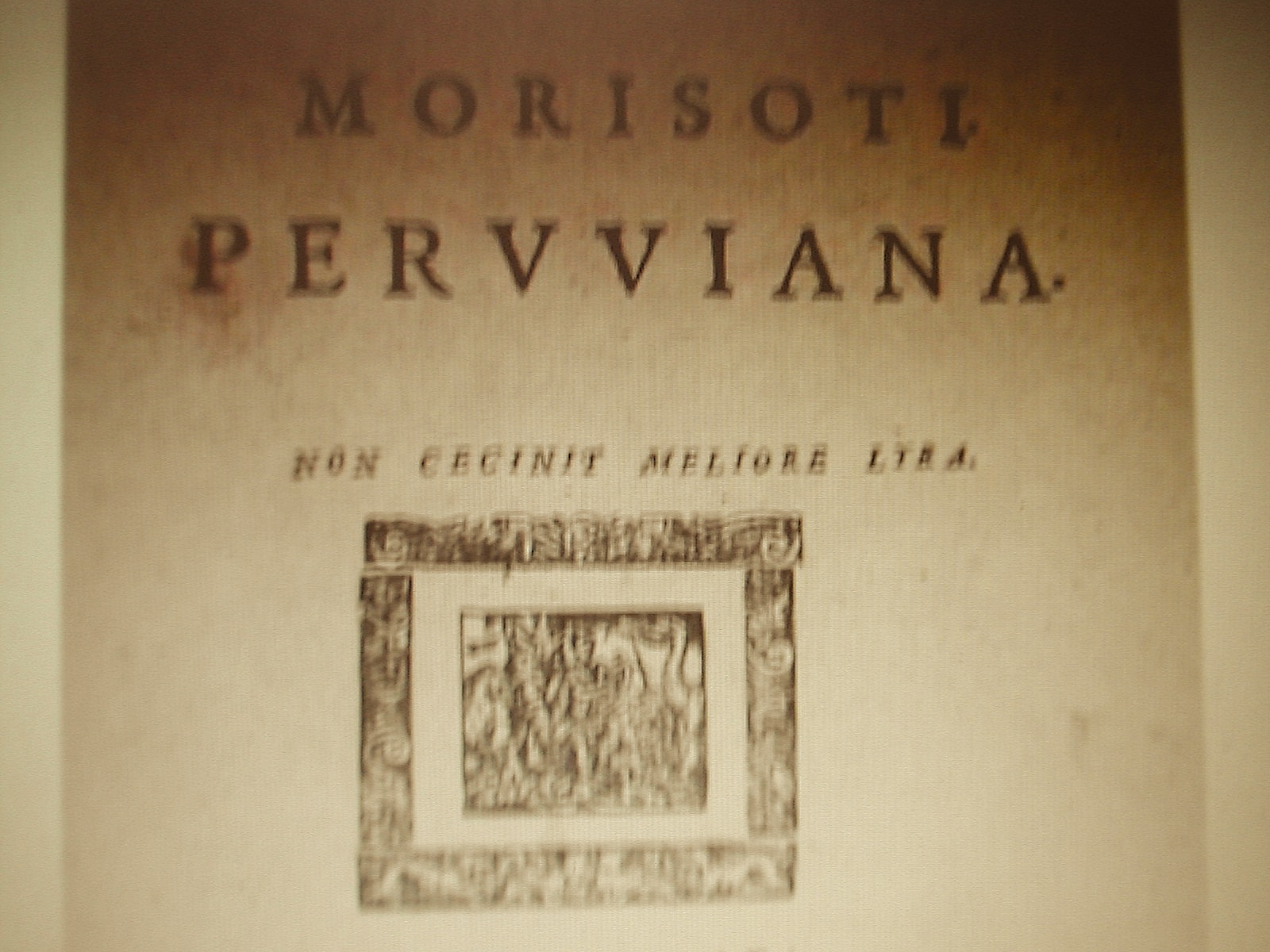 Cliché personnel de la page de titre des Peruviana.